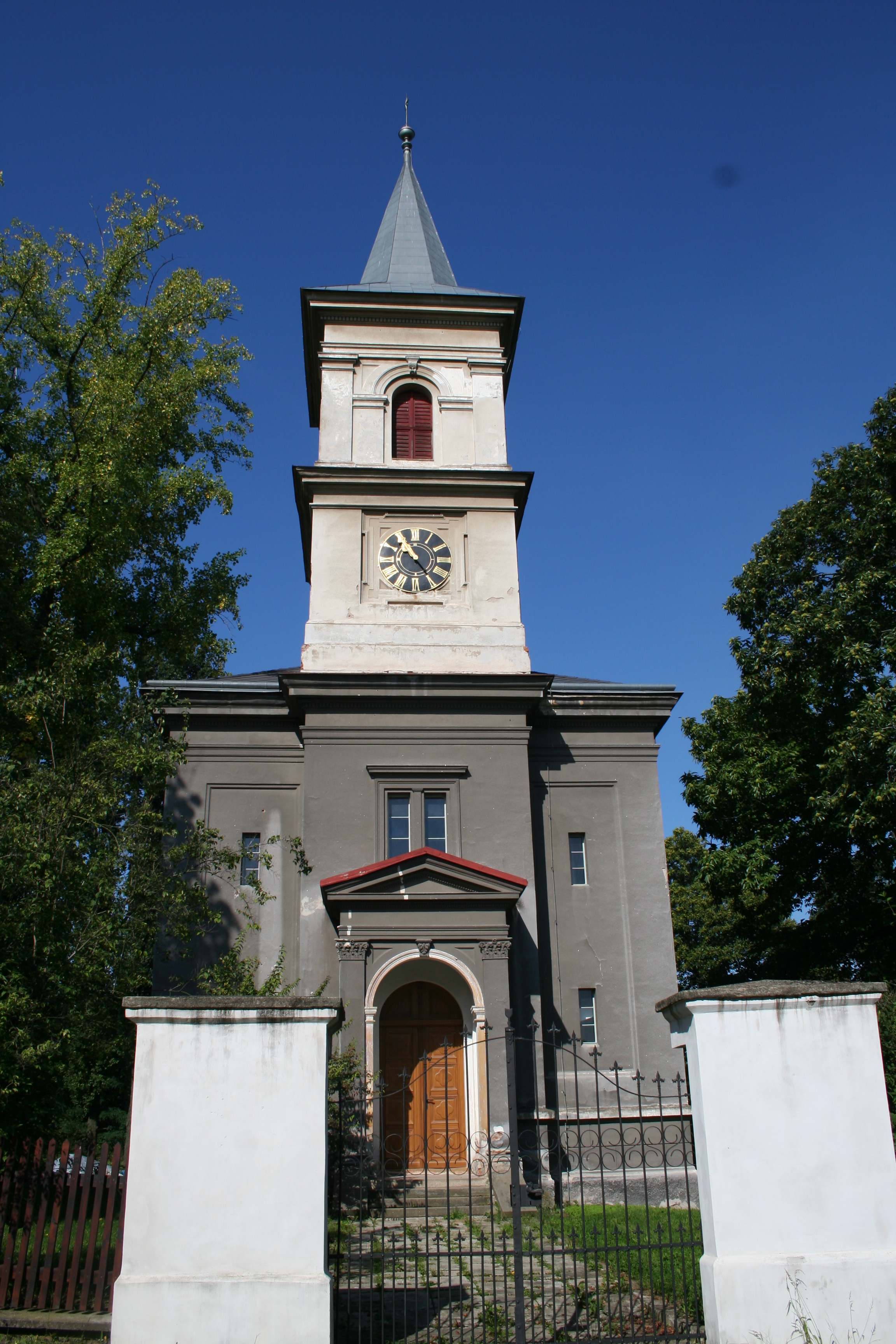 Kostel evangelický (Hornická Čtvrť), Hornická Čtvrť